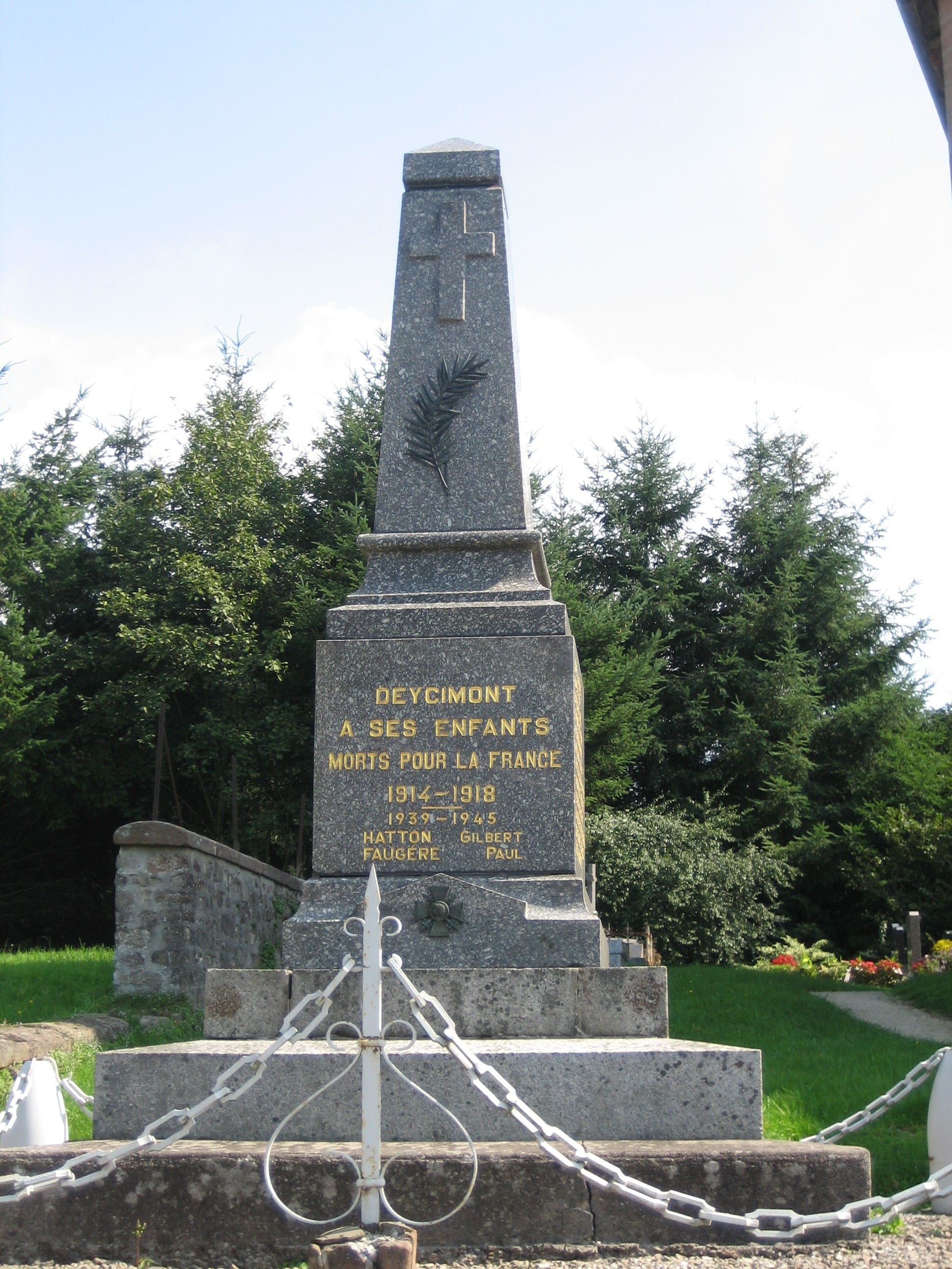 Monument aux morts de Deycimont, by Raphaël Tassin (raphdvoj), 2006/09